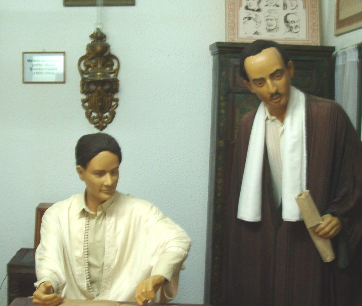 Abul Kacem Ech Chabbi